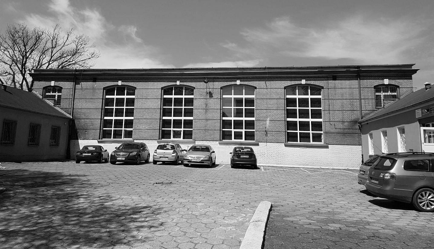 Stargard. Sala gimnastyczna Szkoły Podstawowej nr 2 przy ul. Limanowskiego